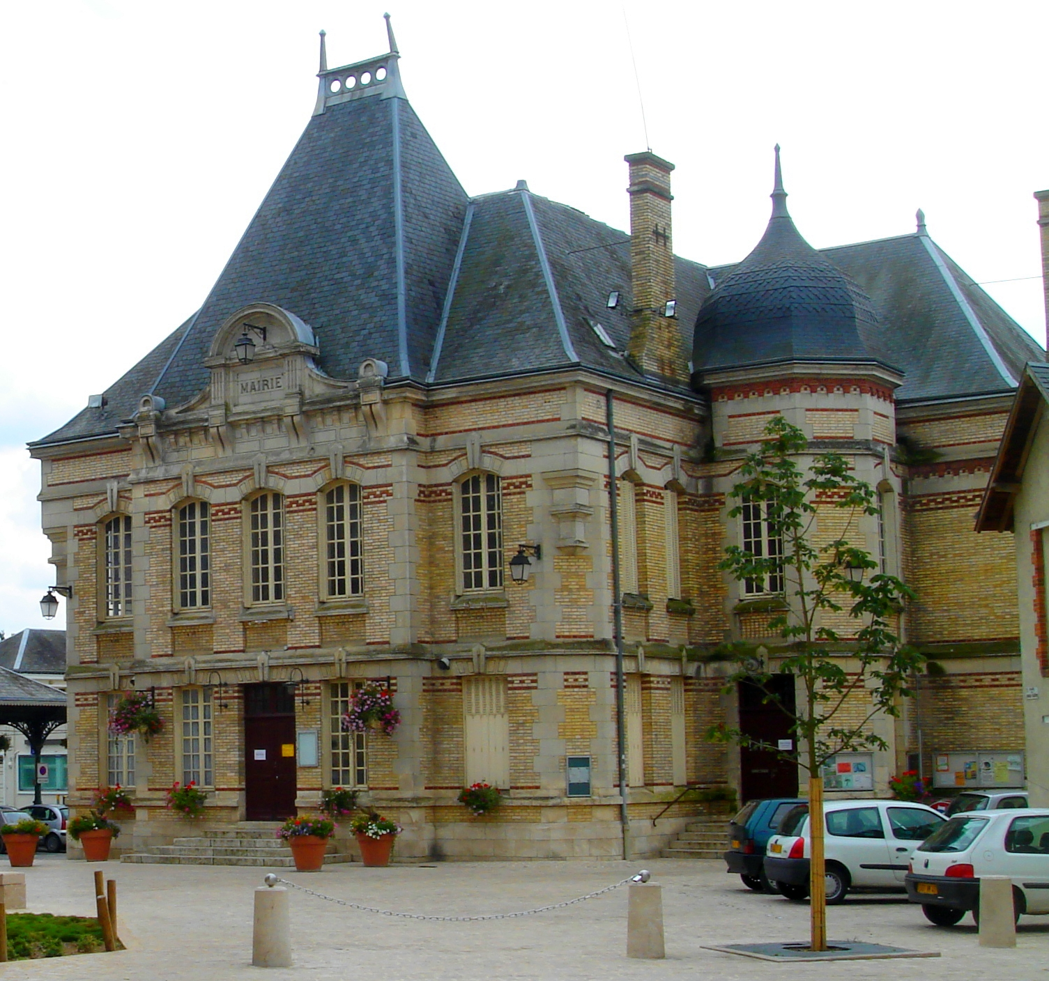 Mairie de Jargeau